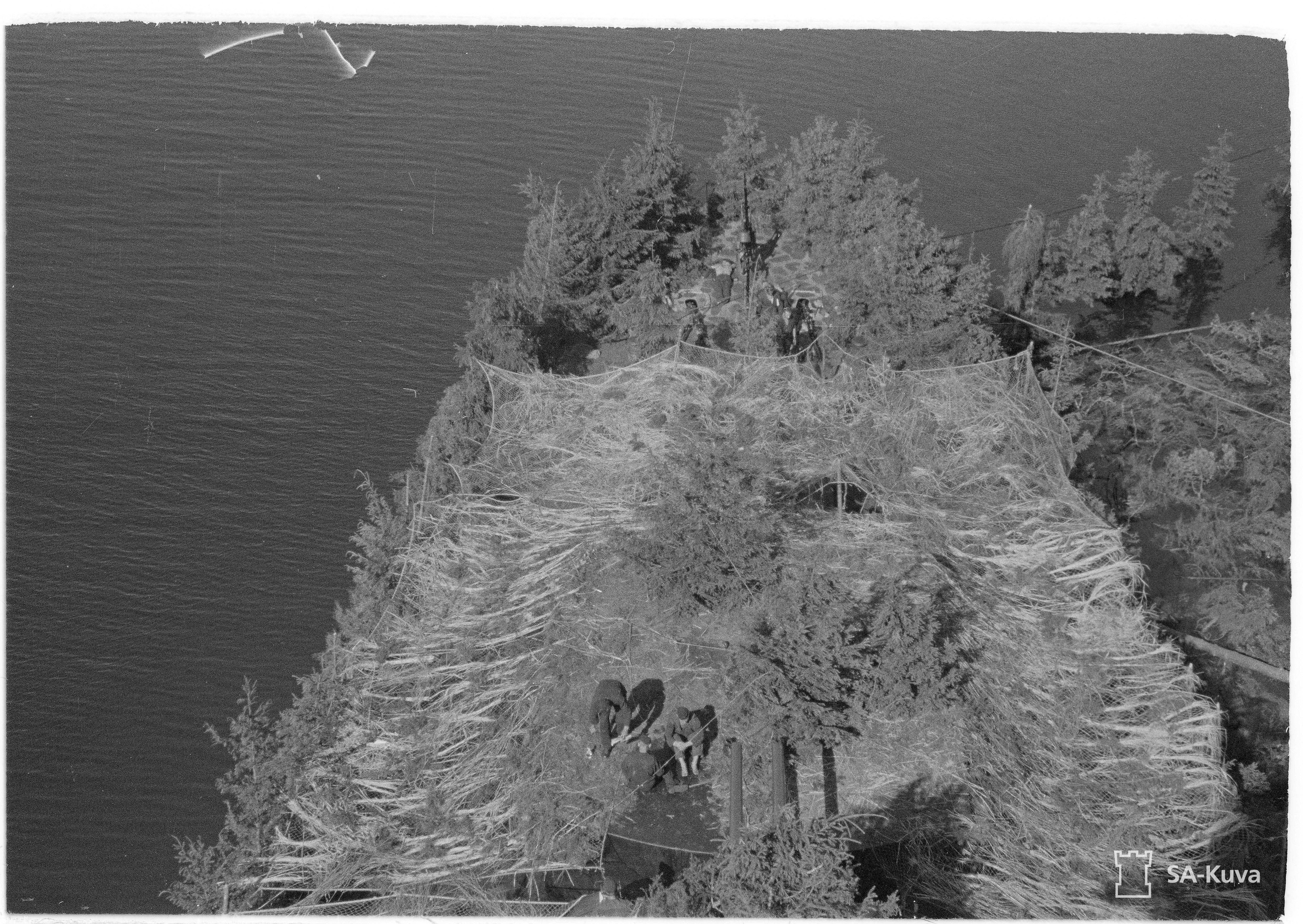 Panssarilaiva Väinämöisen keula.